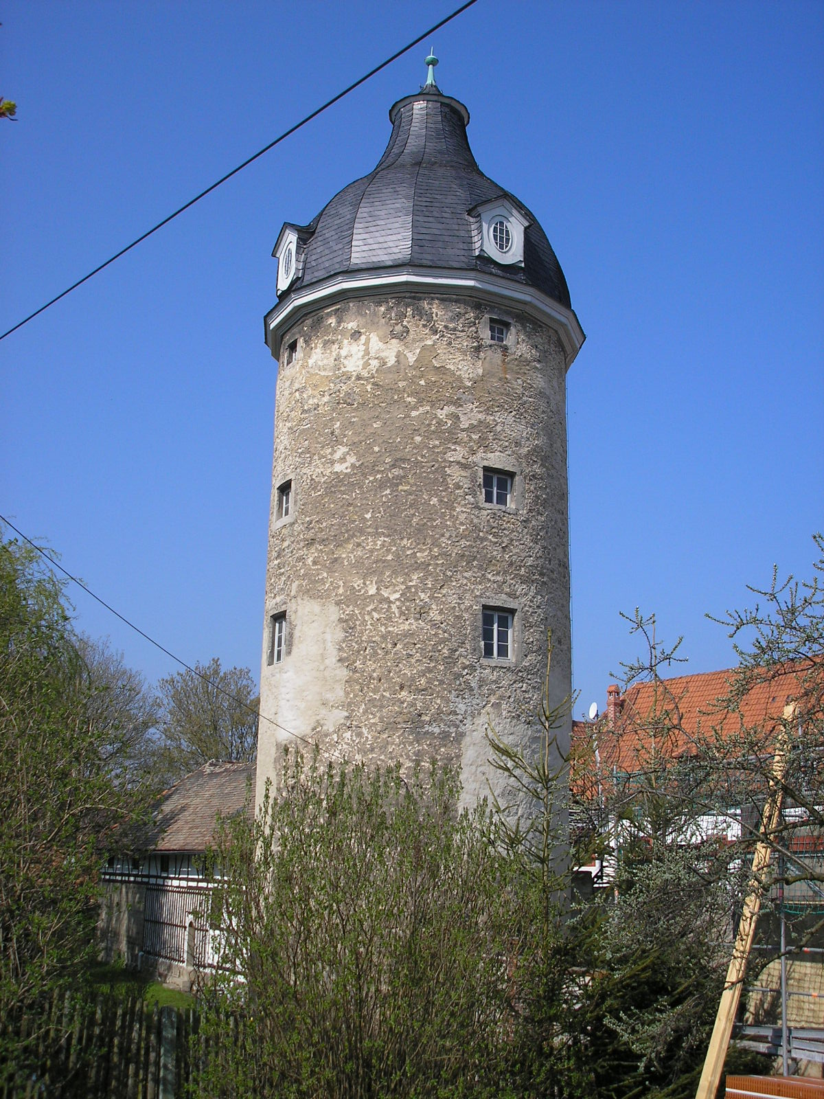 Der Turm der ehemaligen Wasserburg in Lehesten bei Jena (Thüringen).